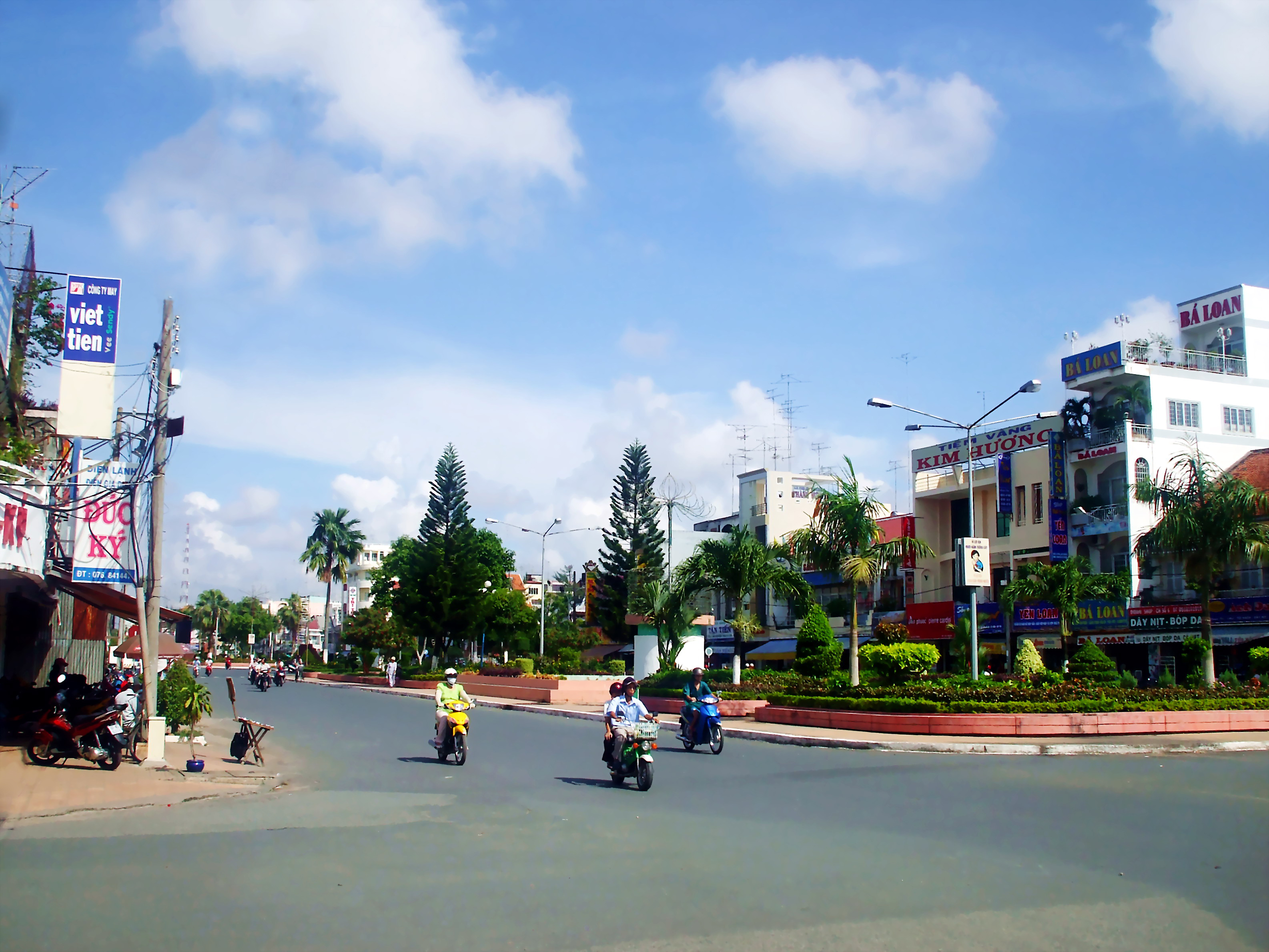 Công viên Hai Bà Trưng tại trung tâm TP. Long Xuyên, An Giang.